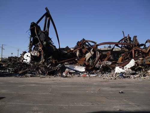 Edificio de una tienda departamental en ruinas tras un incendio en San Luis Río Colorado, Sonora.